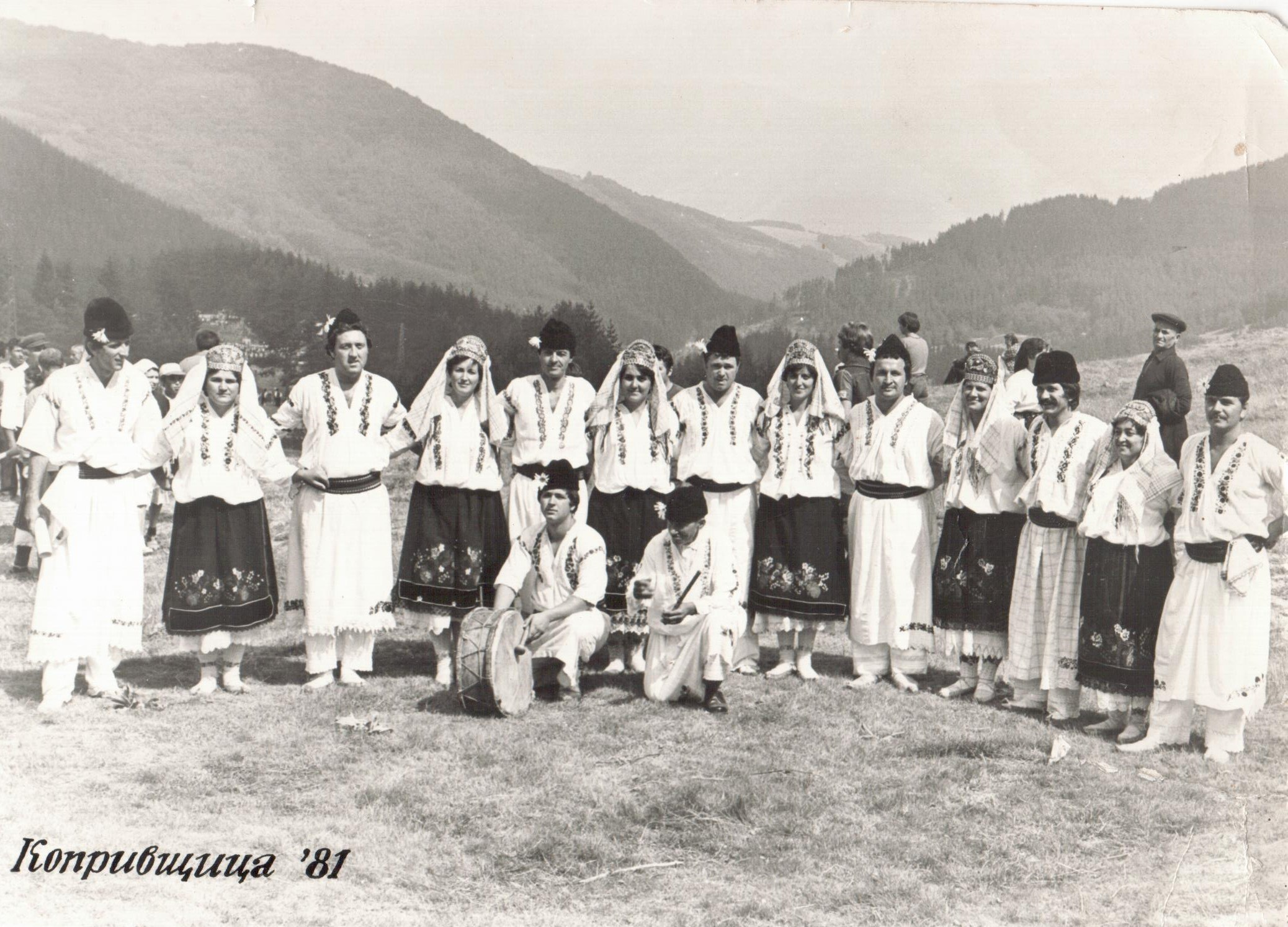 Фолклорен танцов състав към НЧ "Светлина - 1928" с.Неговановци Folklore Dance Folk Chitalishte at Chitalishte "Svetlina"